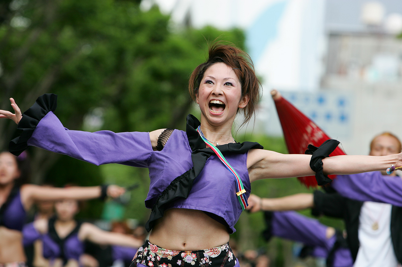 高知よさこい祭り2006